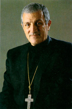 Monsignor Antonio Bello (Alessano, 18 marzo 1935 – Molfetta, 20 aprile 1993).